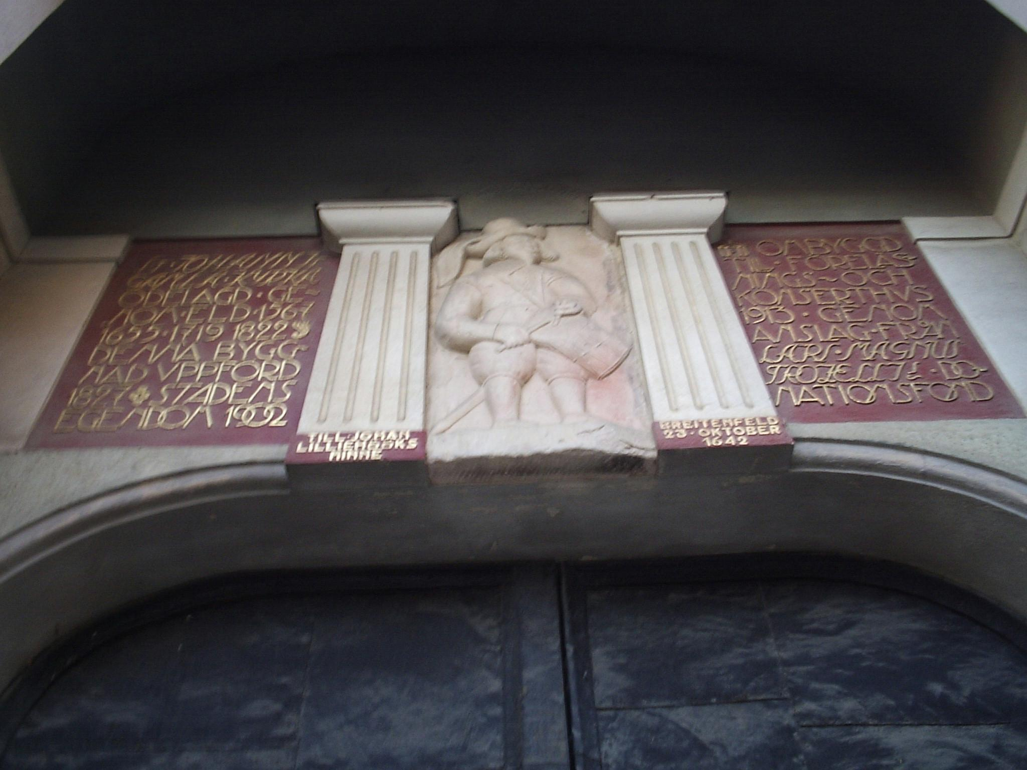 Minnesportal över Johan Lilliehöök ovanför ingången vid Drottninggatan till Sankt Johannes gamla kyrka i Norrköping, den 20 november 2005. Även kyrkans historik berättas här. Fotograferad av Harri Blomberg.